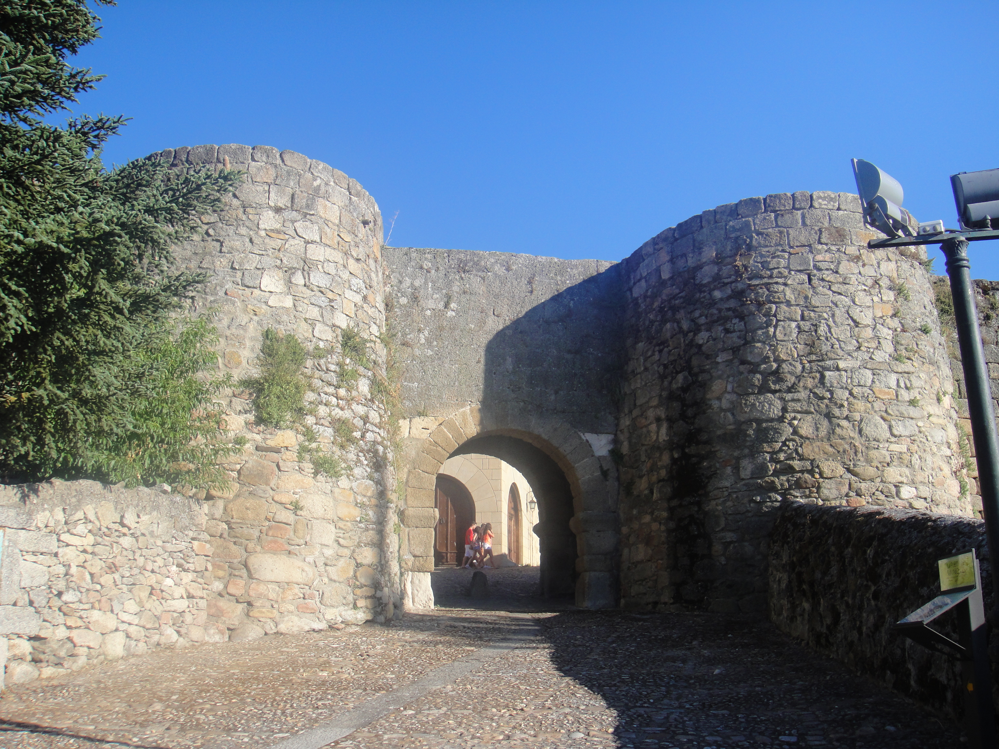 Parte interior de una de las puertas de la muralla de Ledesma, provincia de Salamanca, (España).